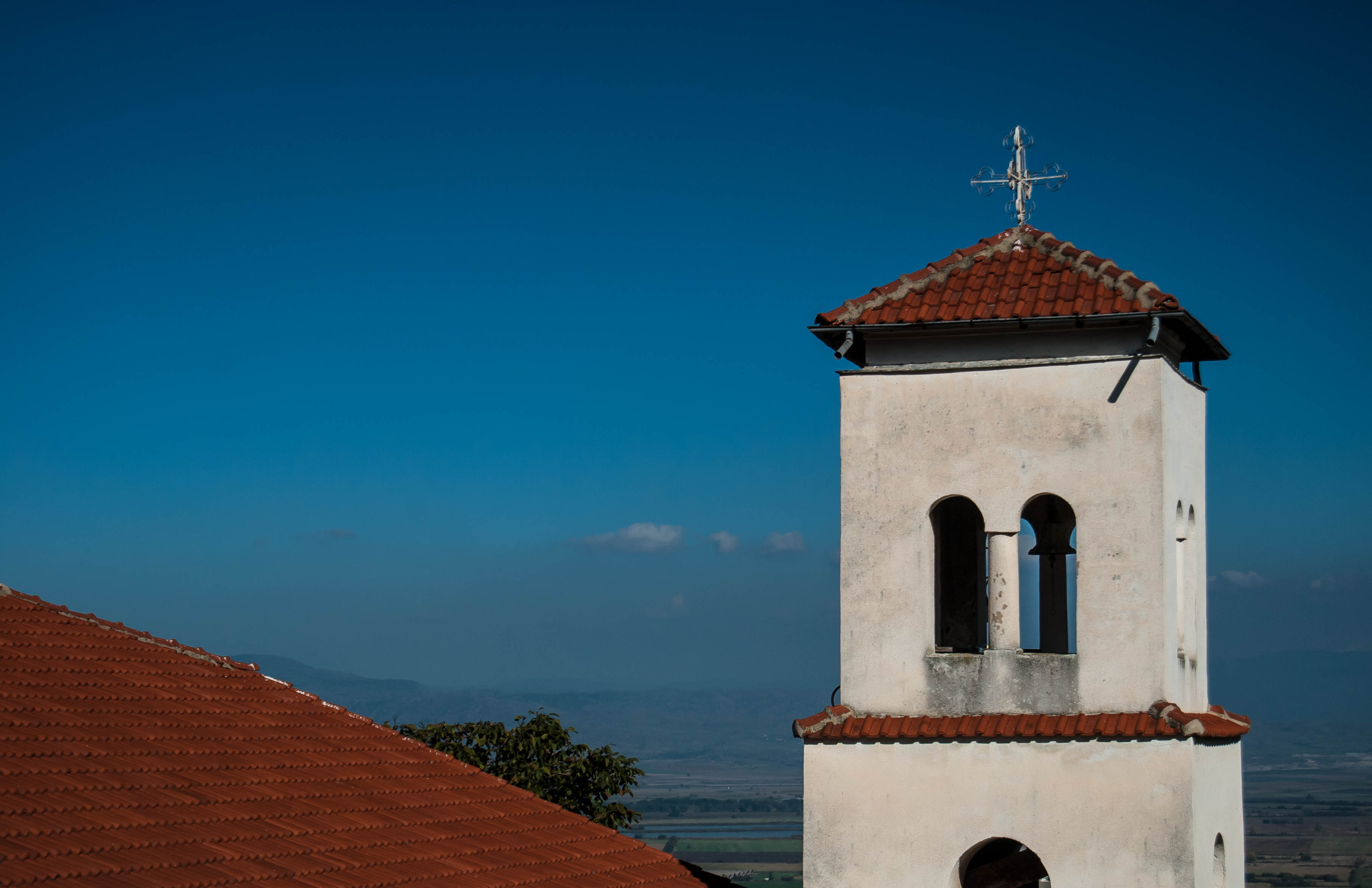 Камбанерија на манастирот „Св. Ѓорѓи“ во Велушина